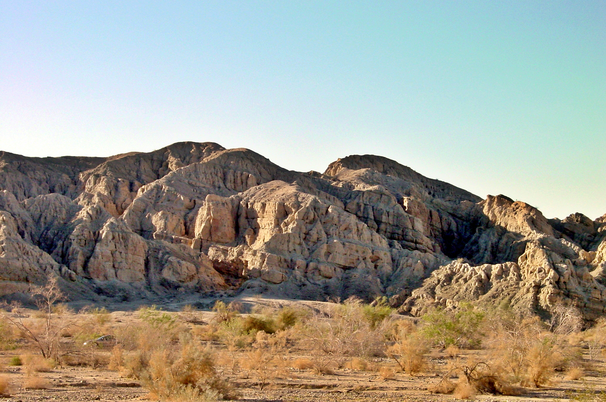 Orocopia Mountains vues de la Box canyon Road, conté de Riverside, état de Californie, États Unis d'Amérique.